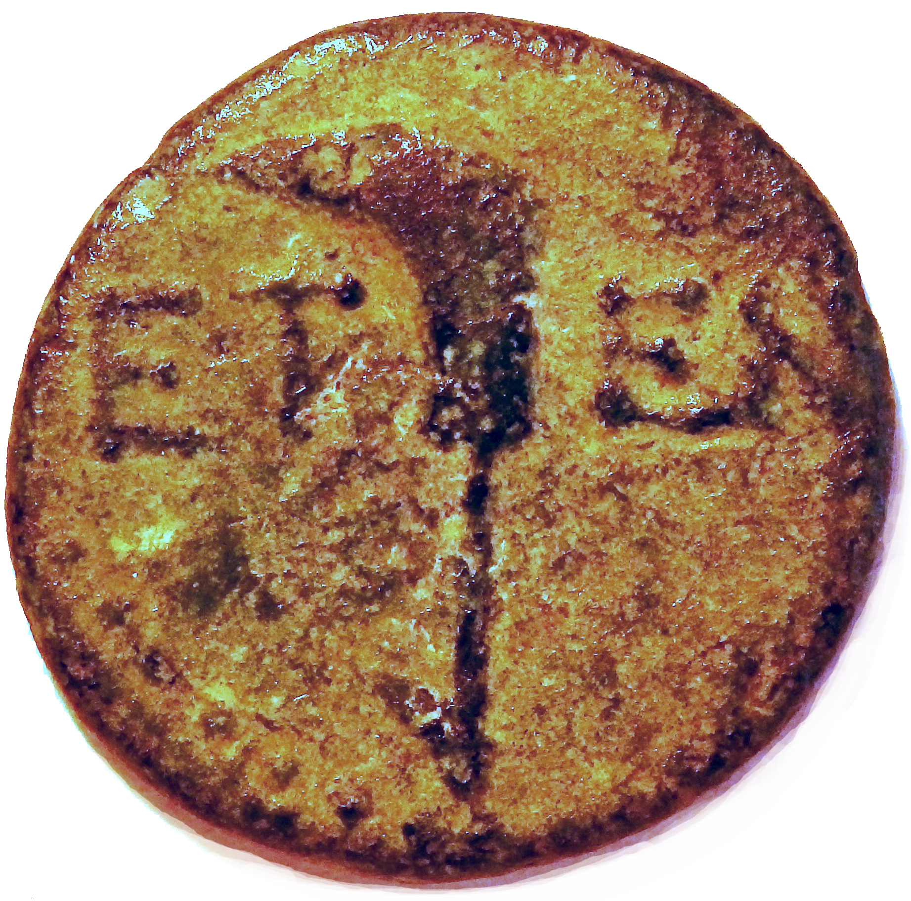 Bronzemünze aus Etenna mit Krummesser und Stadtnamen, 1. Jh. v. Chr., BMC 4f